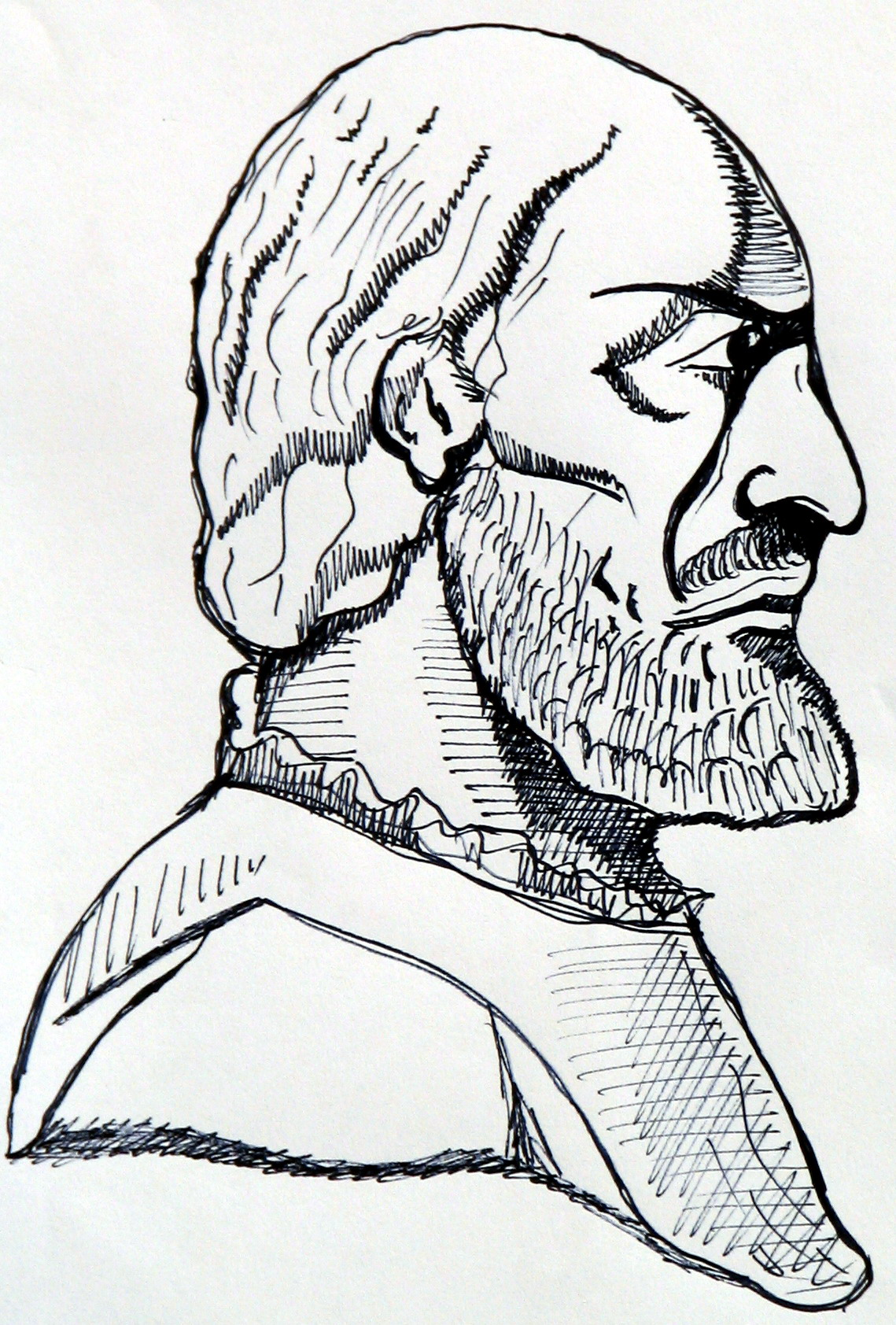 Giovan Giorgo Alione, poeta astigiano cinquecentesco